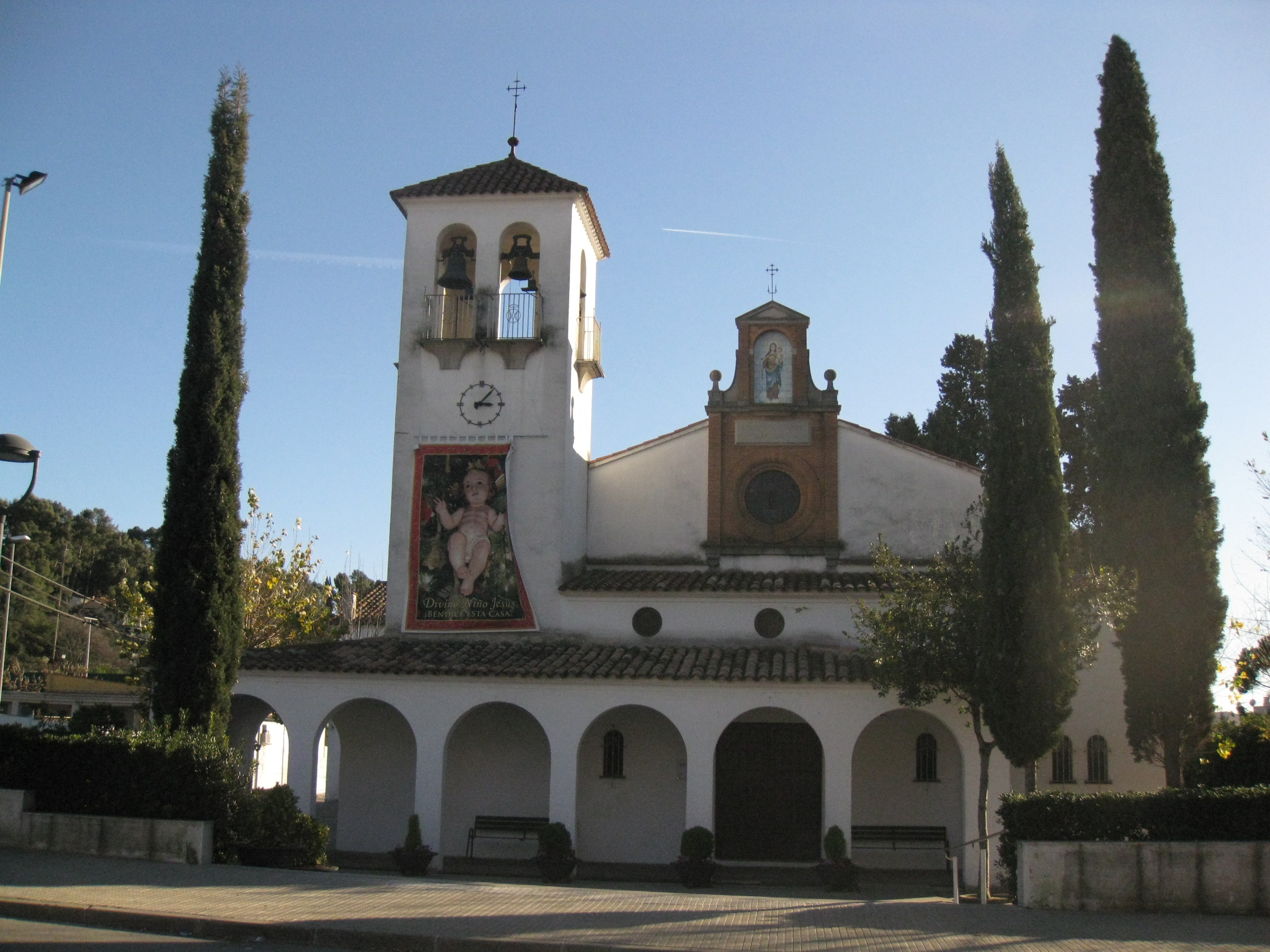 Les Fonts, la Mare de Déu del Roser